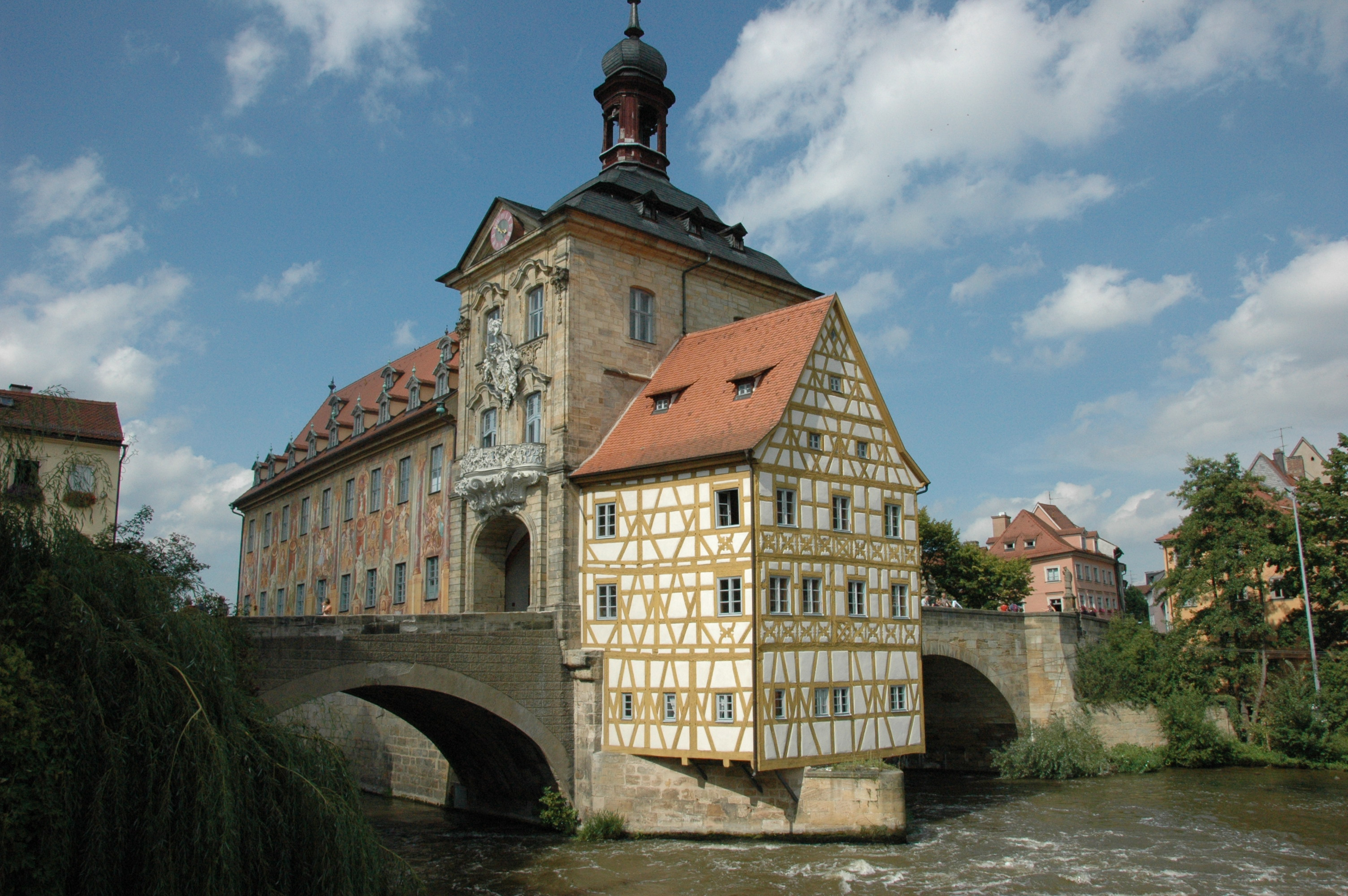 Bamberg